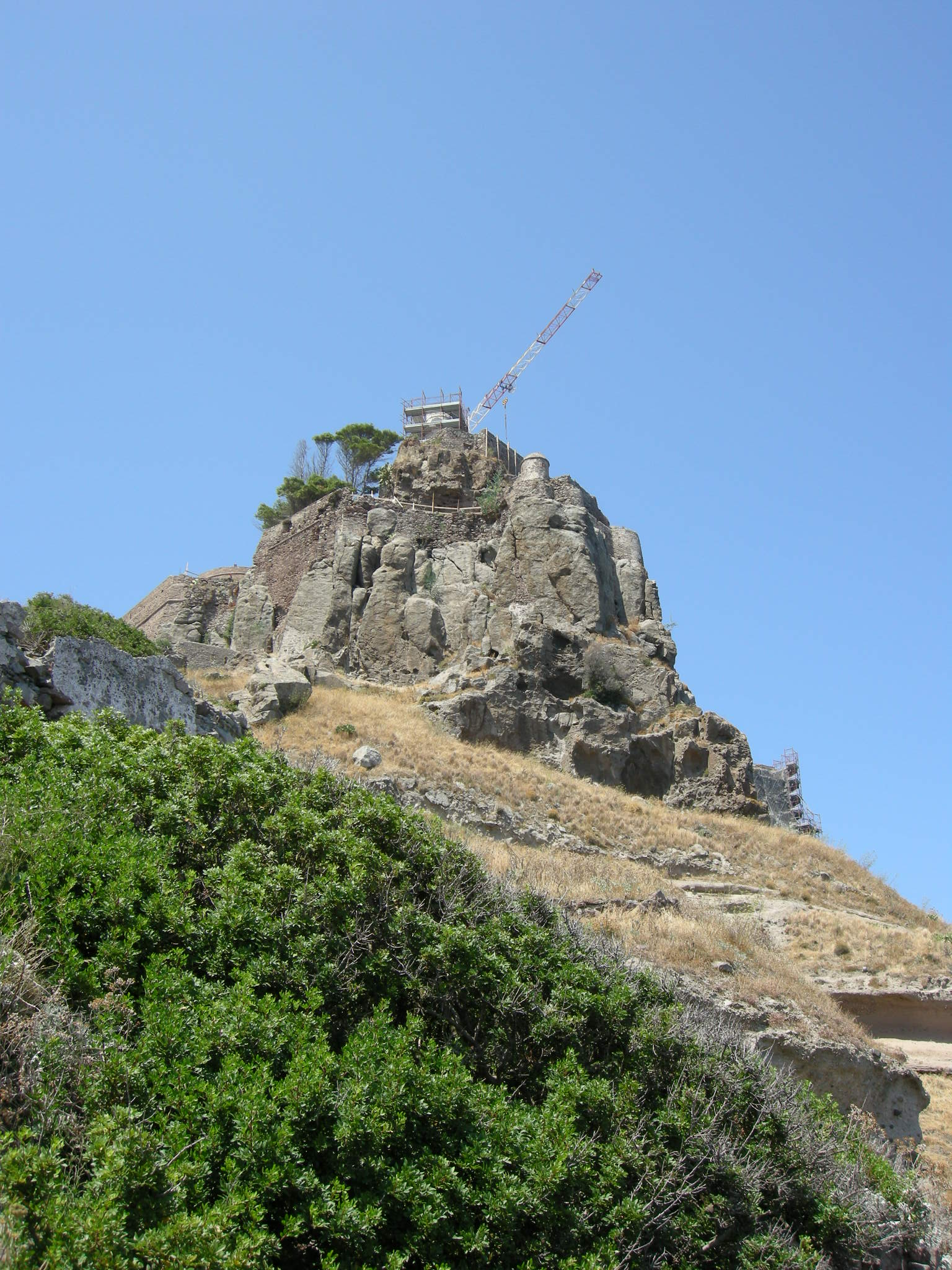 Forte di san giorgiod al basso